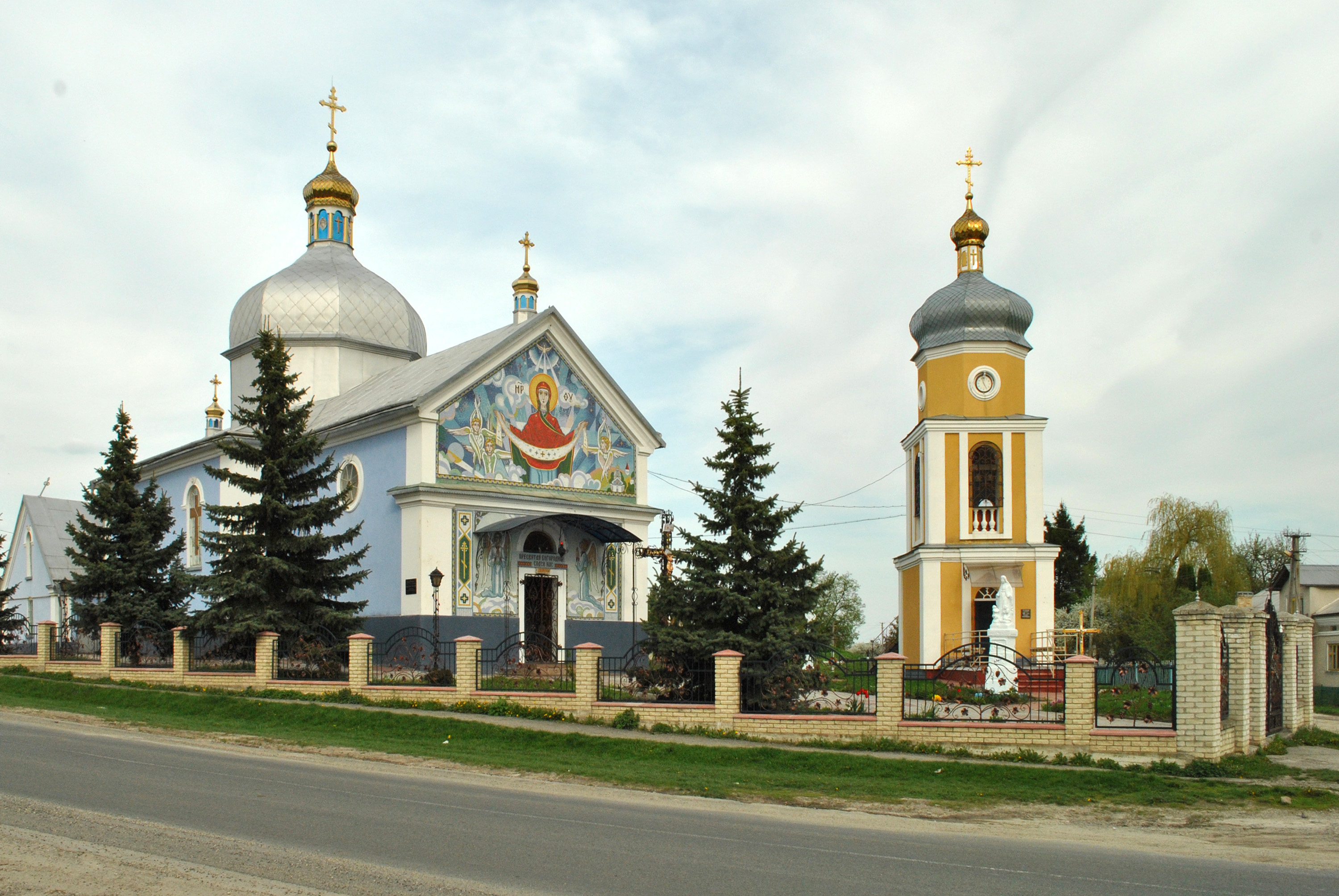 Церква Покрови Пресвятої Діви Марії (мур.) у селі Мишковичі Тернопільського району Тернопільської області.